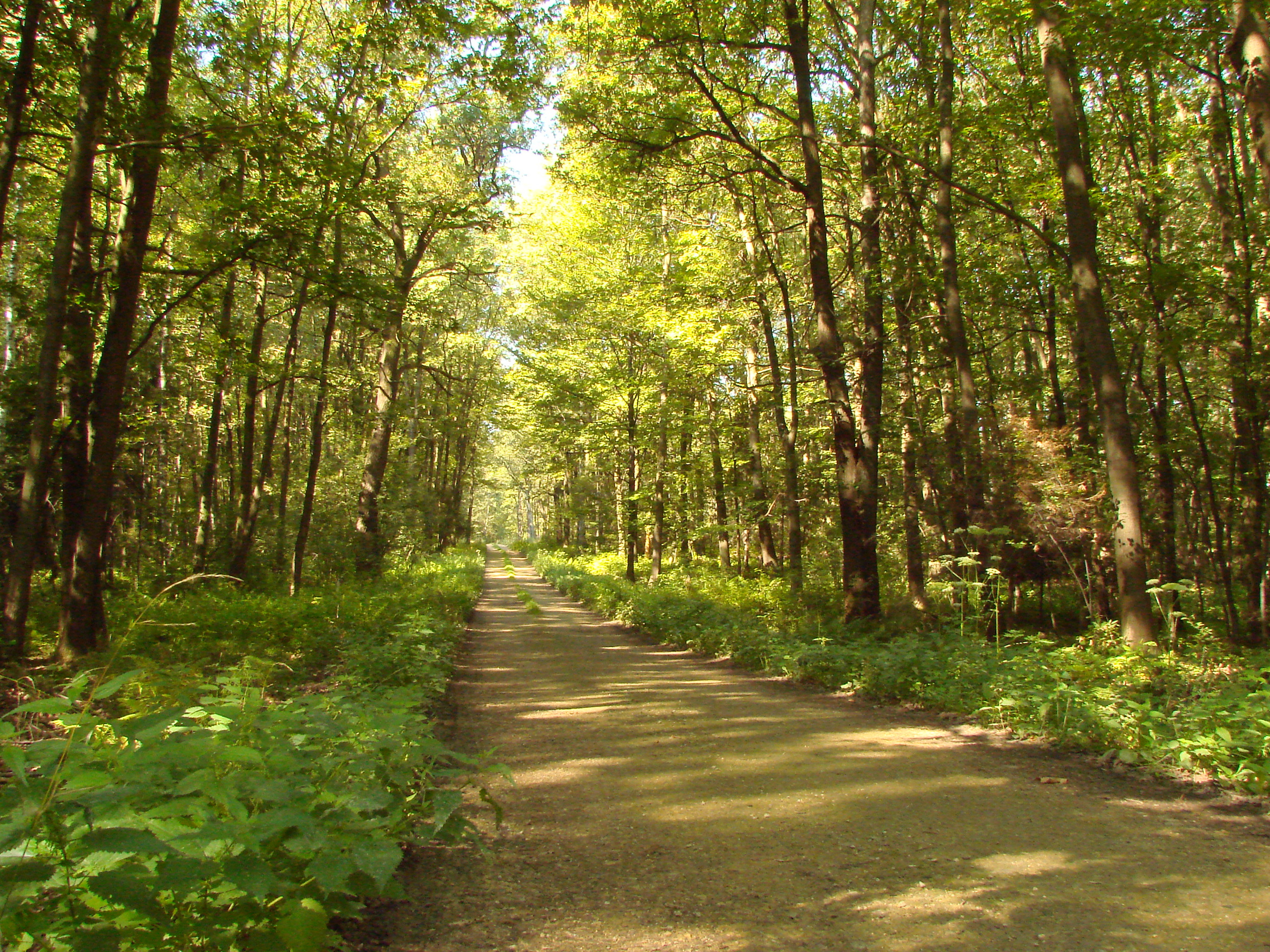 Tyskie lasy otaczające miasto.Od południa, wschodu i zachodu miasto otaczają Lasy Pszczyńskie ,a na północ od miasta znajdują się Lasy Katowicko-Murckowskie.